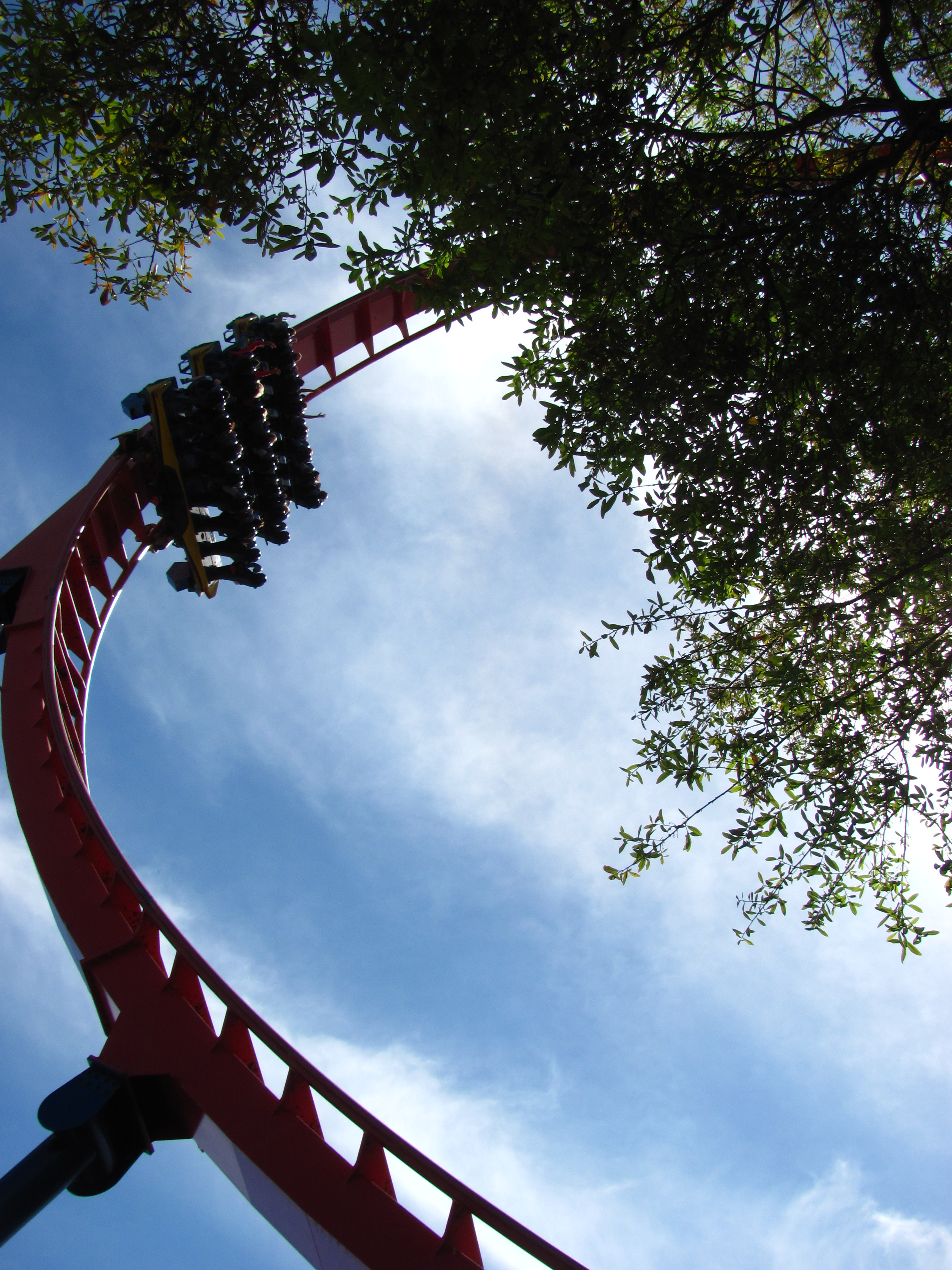 SheiKra